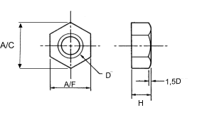 標準公制六角螺母尺寸